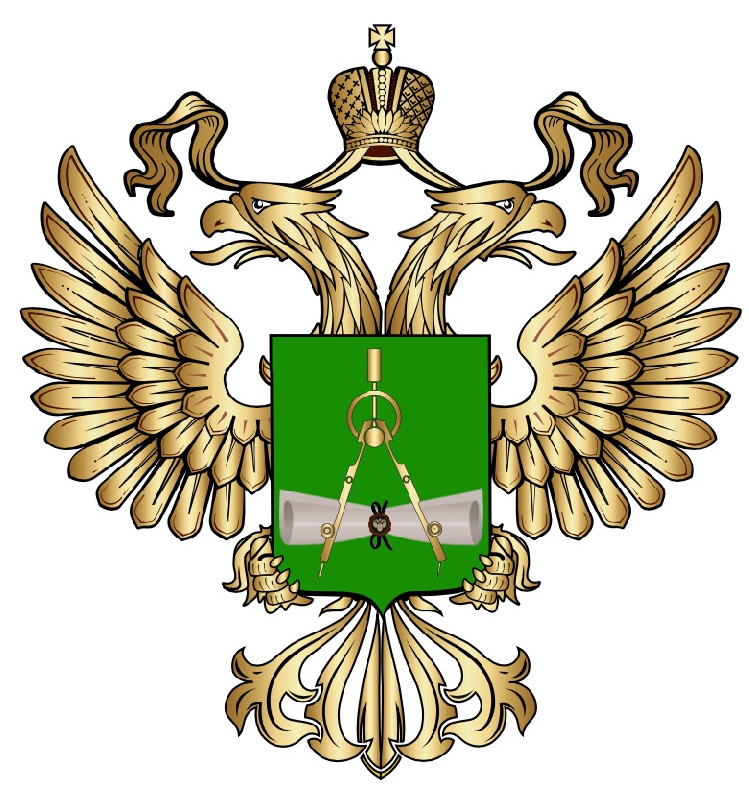 Утверждён приказом Минпромторга РФ от 20.02.2017 № 479 "Об учреждении геральдического знака - эмблемы Федерального агентства по техническому регулированию и метрологии". Эмблема разработана по согласованию с Геральдическим советом при Президенте Российской Федерации.